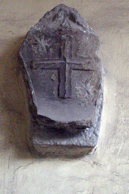 Fragment d'un emblème de Castrocaro Terme